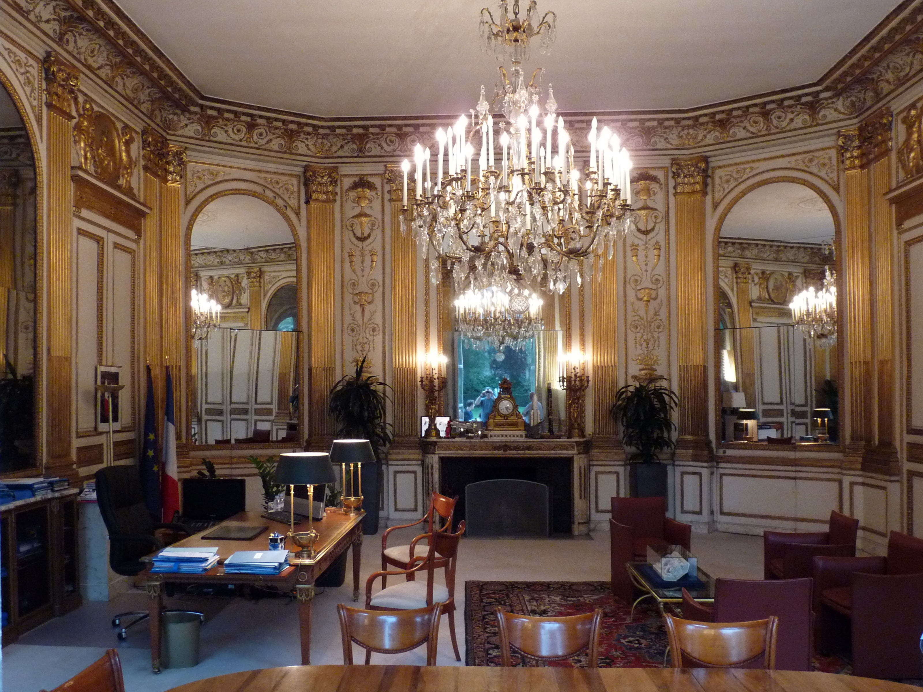 Le bureau du ministre à l'hôtel du Châtelet, Paris. Photo prise lors des journées du patrimoine 2011.